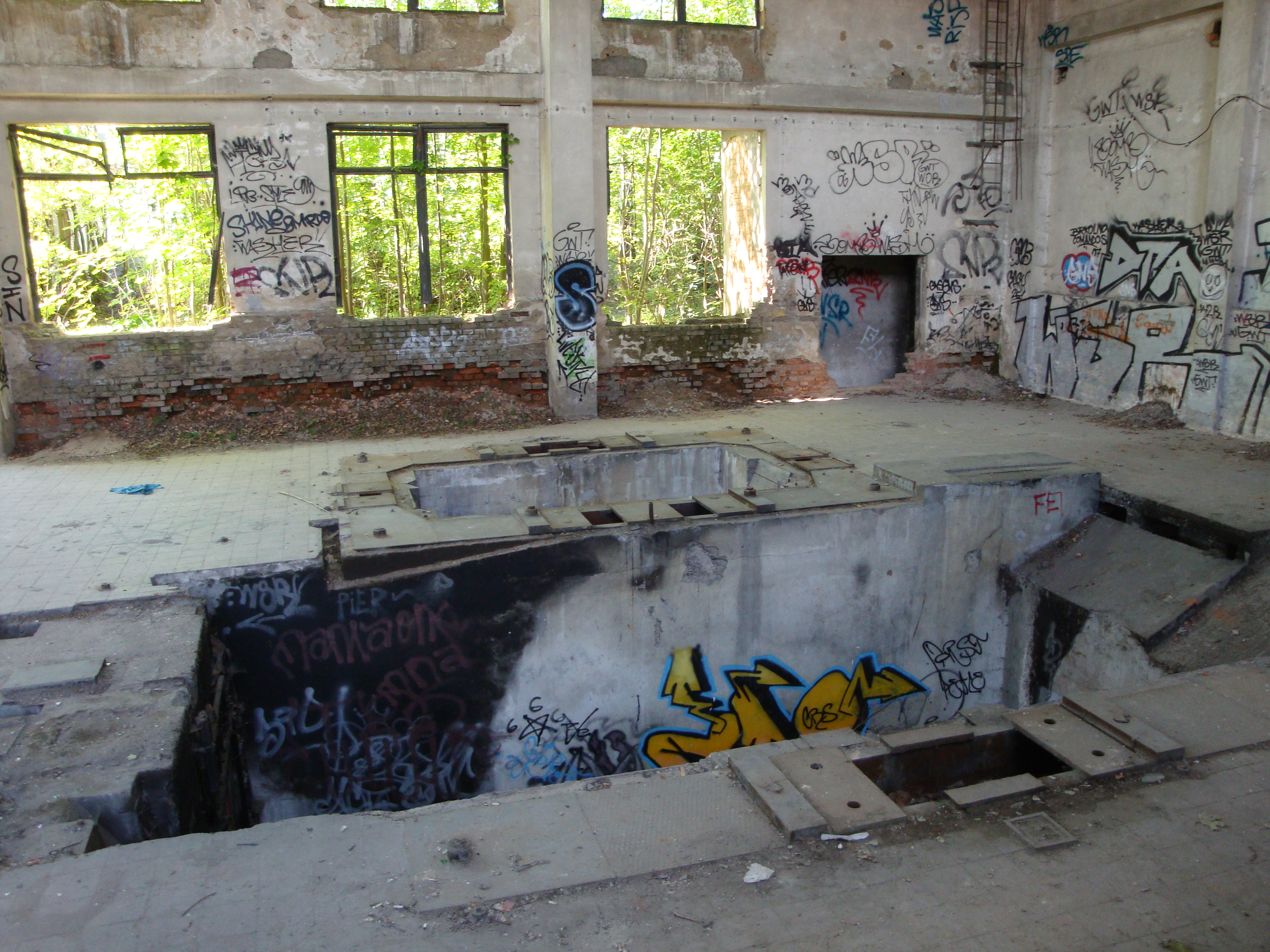 Interiér chátrajícího Prokopského dolu na Březových Horách